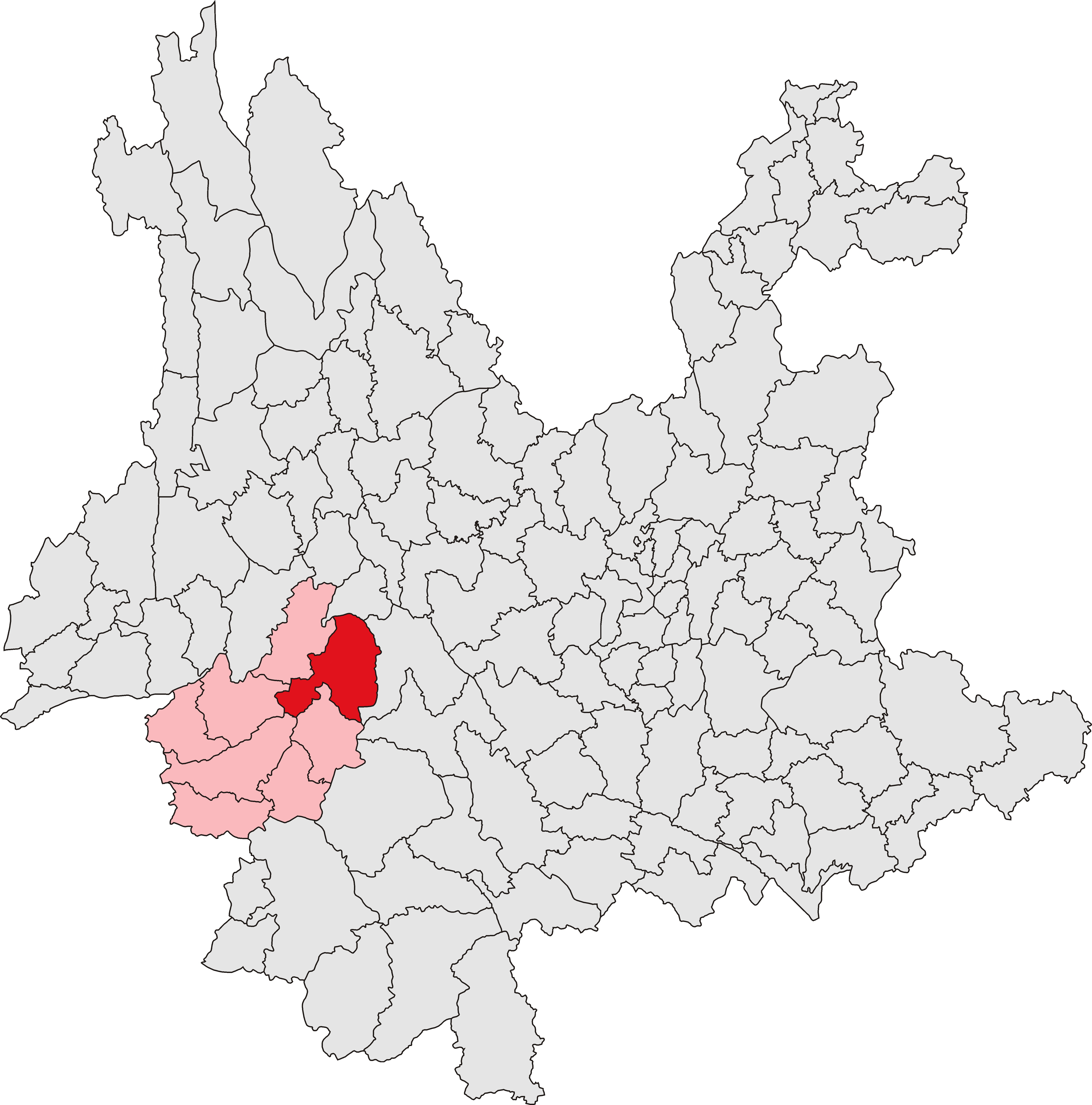 云县位置图